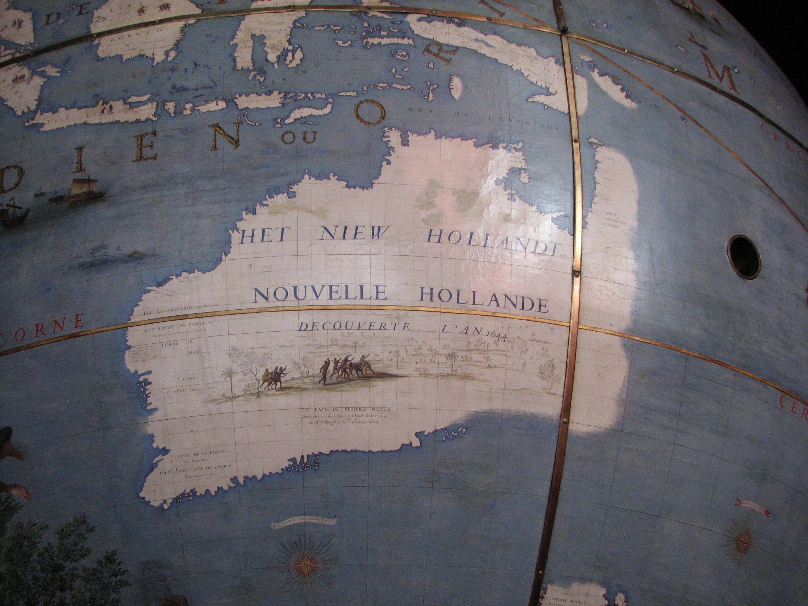 Détail de la carte de la Nouvelle-Hollande (actuelle Australie) sur le Globes de Coronelli, Bibliothèque François MitterrandDetail of New Holland map (now Australia) on the Globes de Coronelli, National french library Francois Mitterrand, Paris